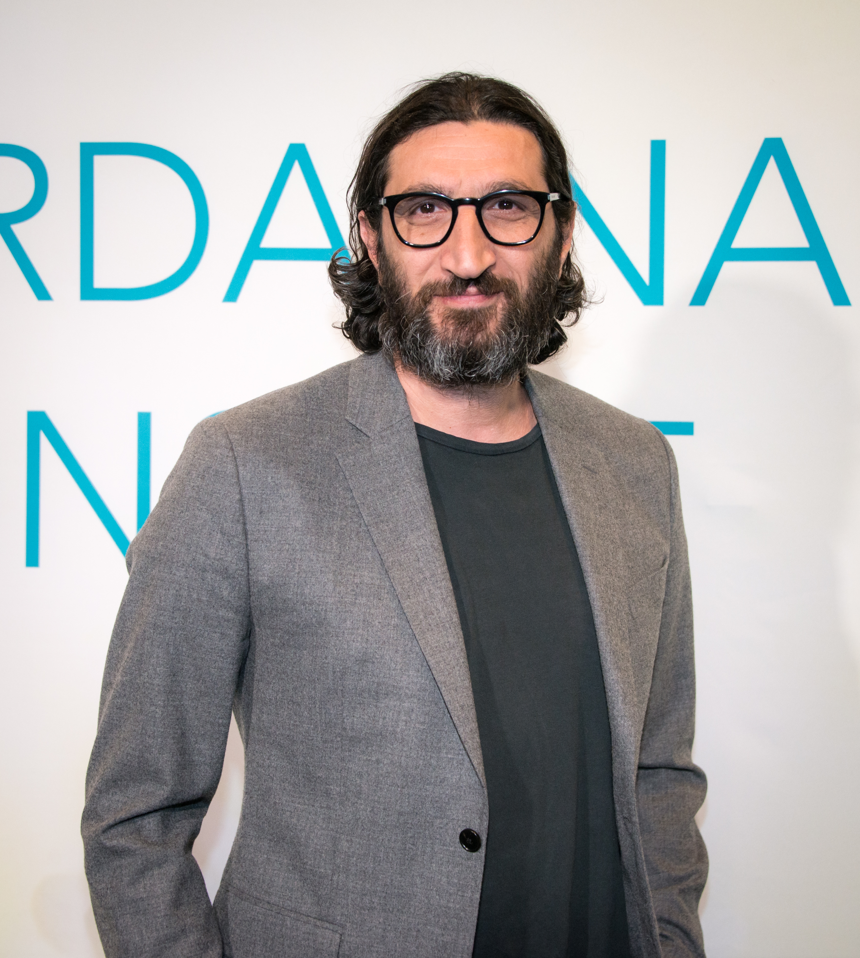 Fares Fares, Sommarvärd i P1, på röda mattan på väg in i Berwaldhallen i Stockholm den 13 juni 2019.